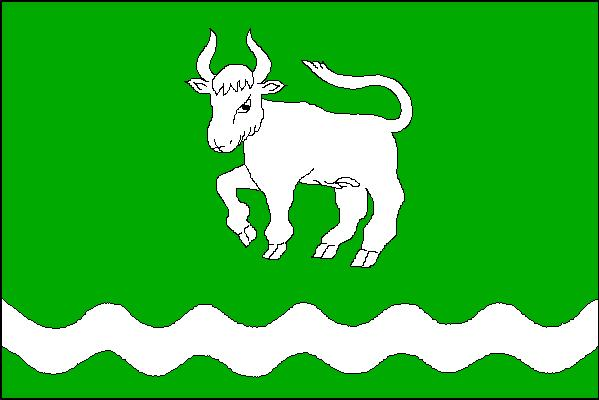 Vlajka obce Vyšní Lhoty